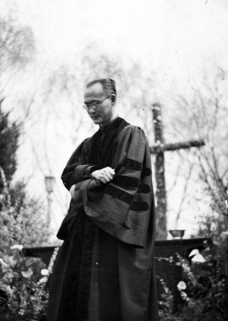 христианский мыслитель 赵紫宸